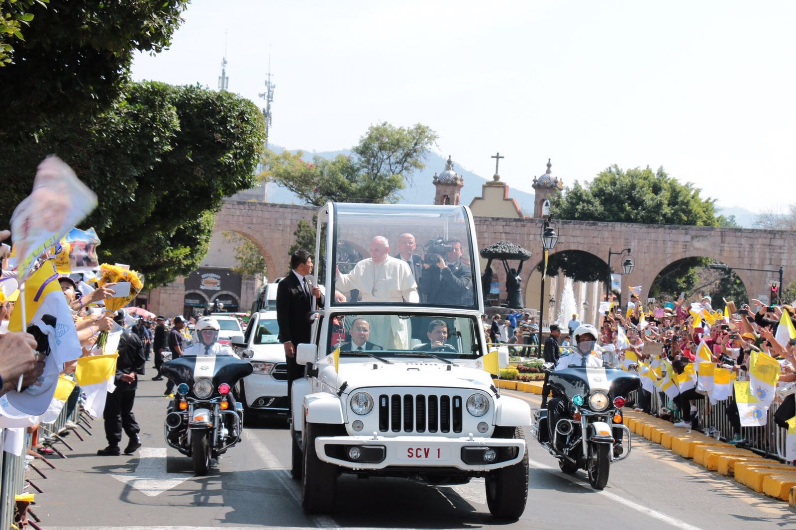 Visita del Papa Francisco a Morelia 16/02/2017